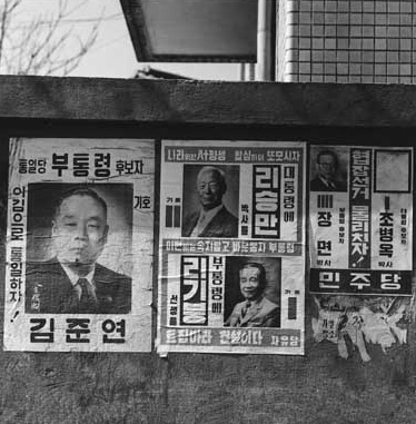 1960년 3월, 선거 벽보 포스터(대통령후보 이승만, 조병옥, 부통령후보 장면, 이기붕, 김준연 등)